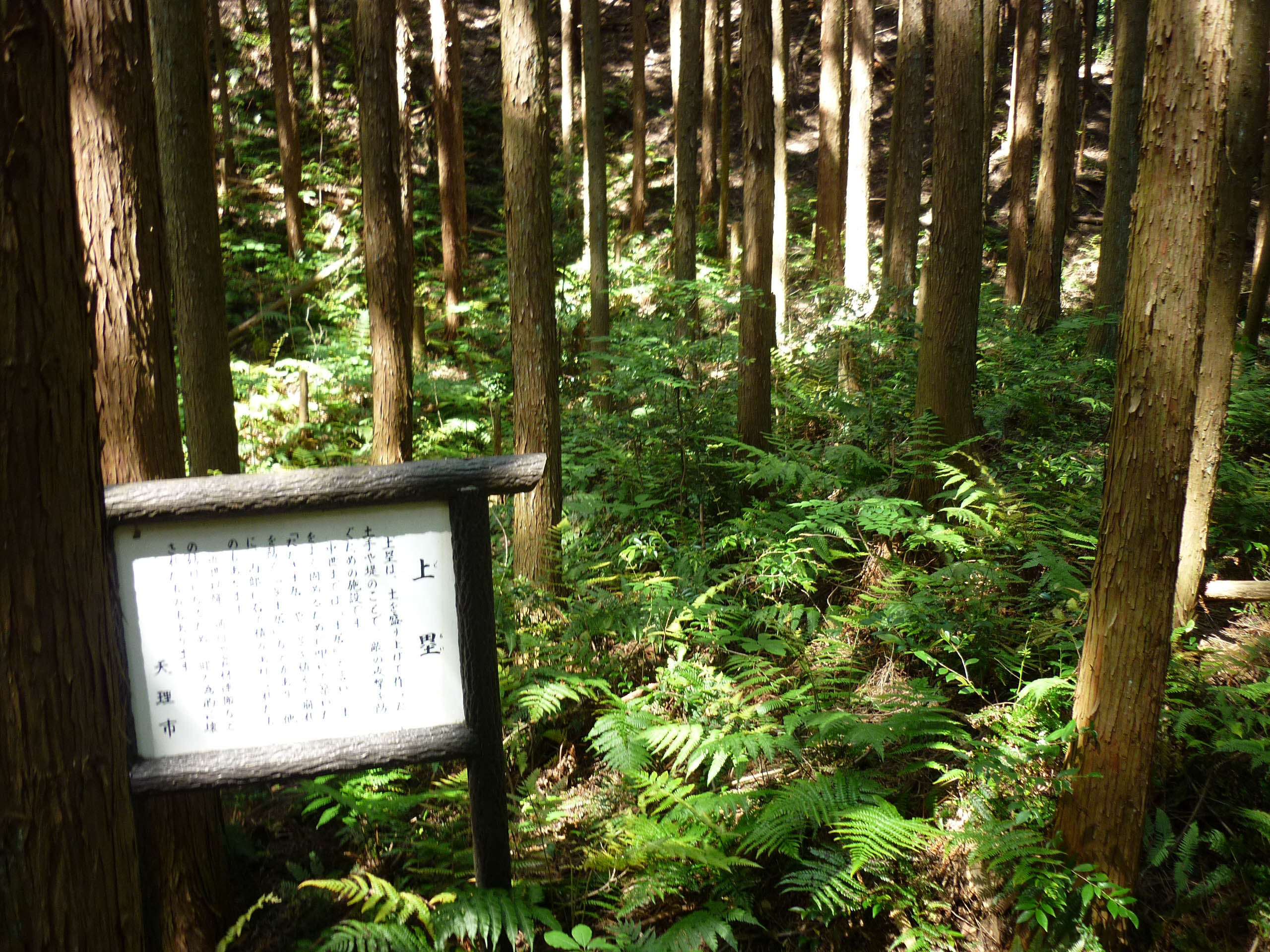 南虎口周辺にある土塁跡